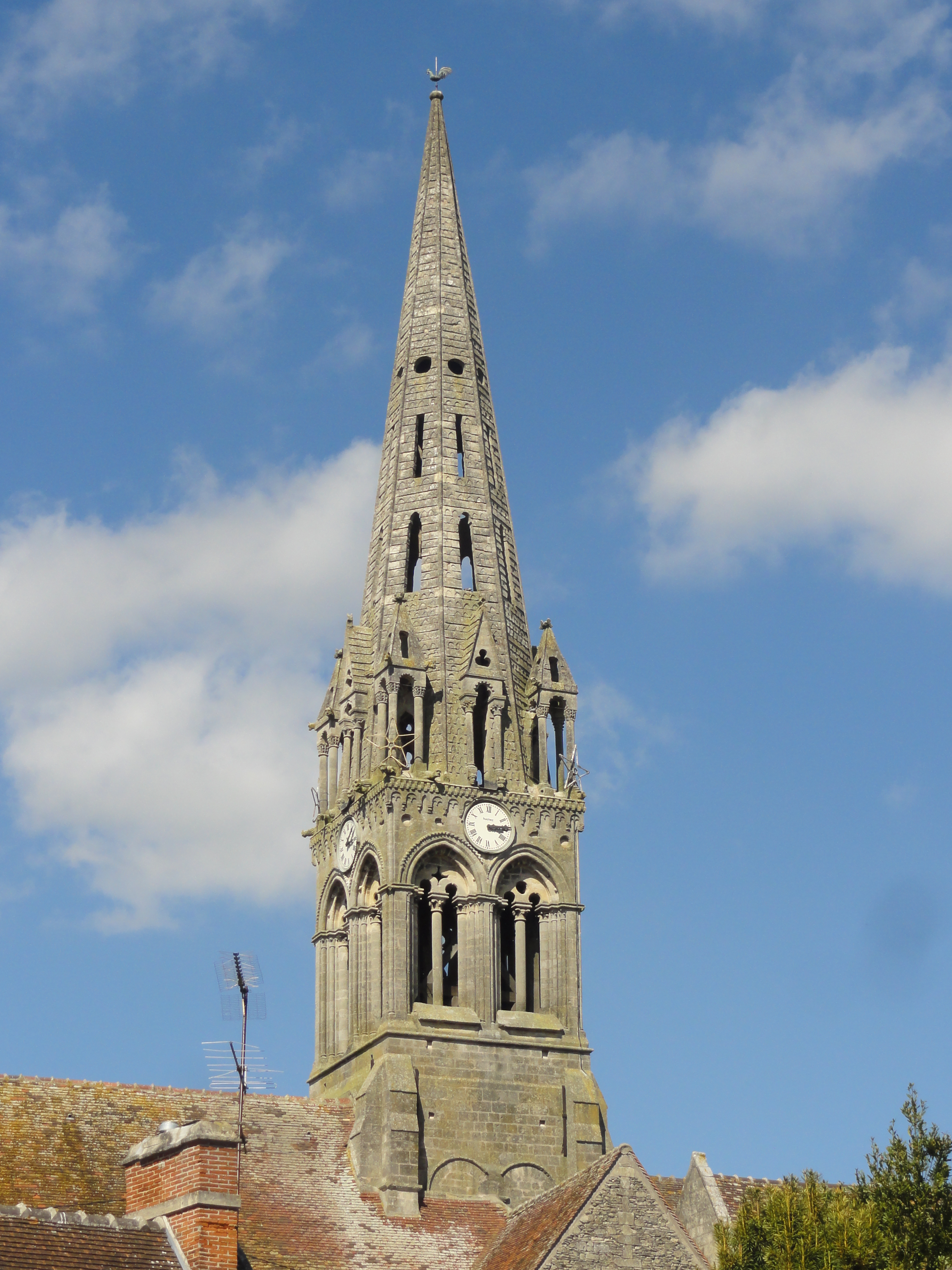 Clocher, vue depuis le sud.